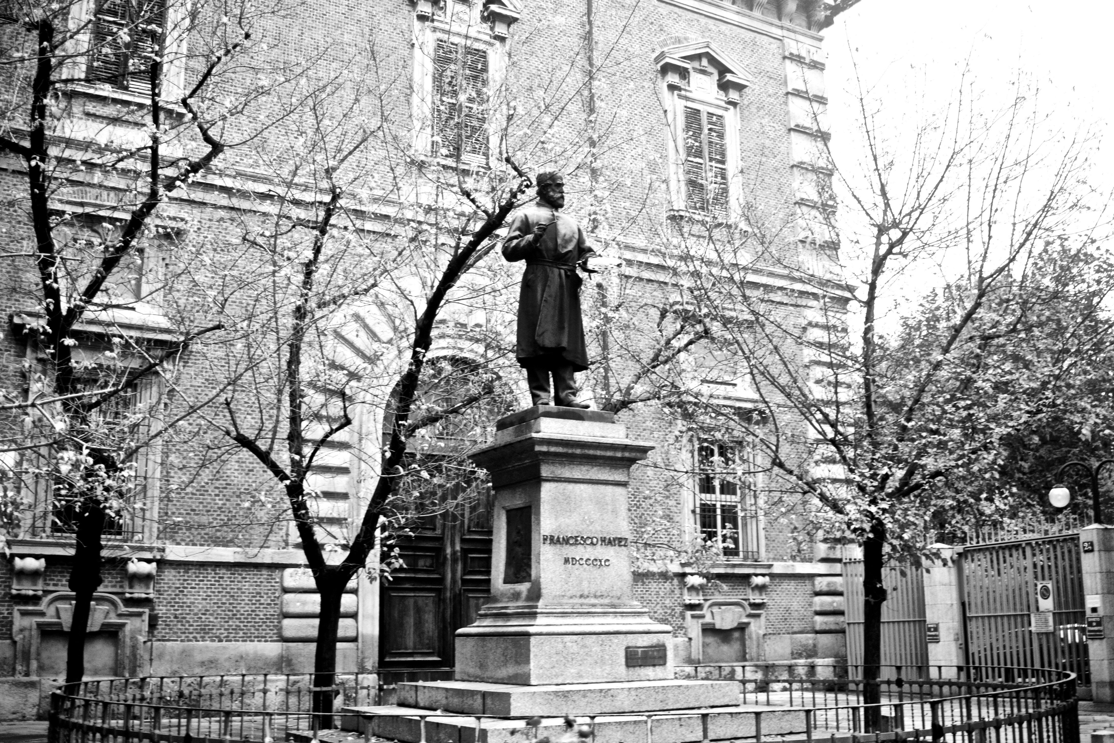 Statua Hayez a Brera